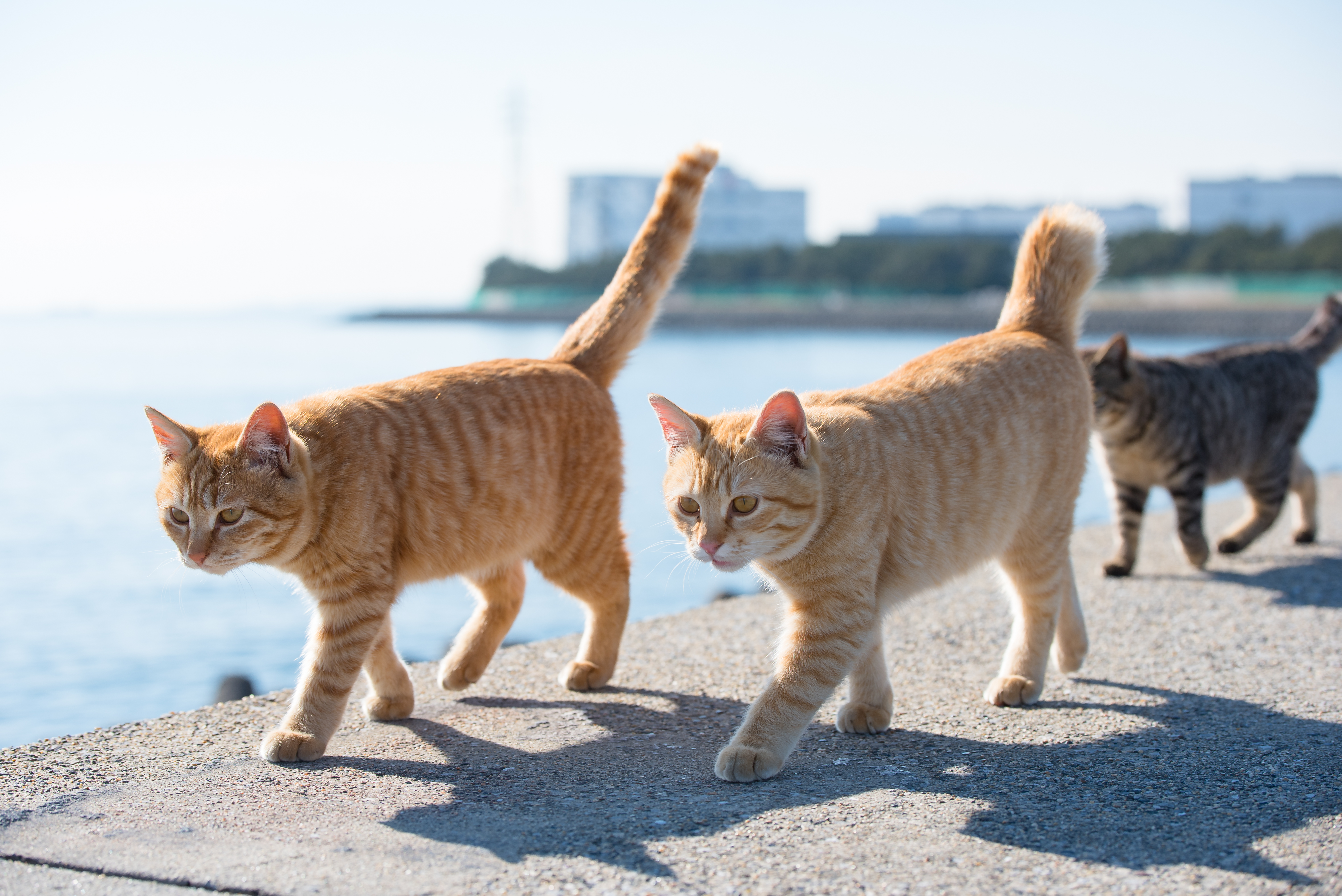 引き続き、テトラポッターズ さて問題、どっちが女の子でしょうか？ 両方ではないですよ